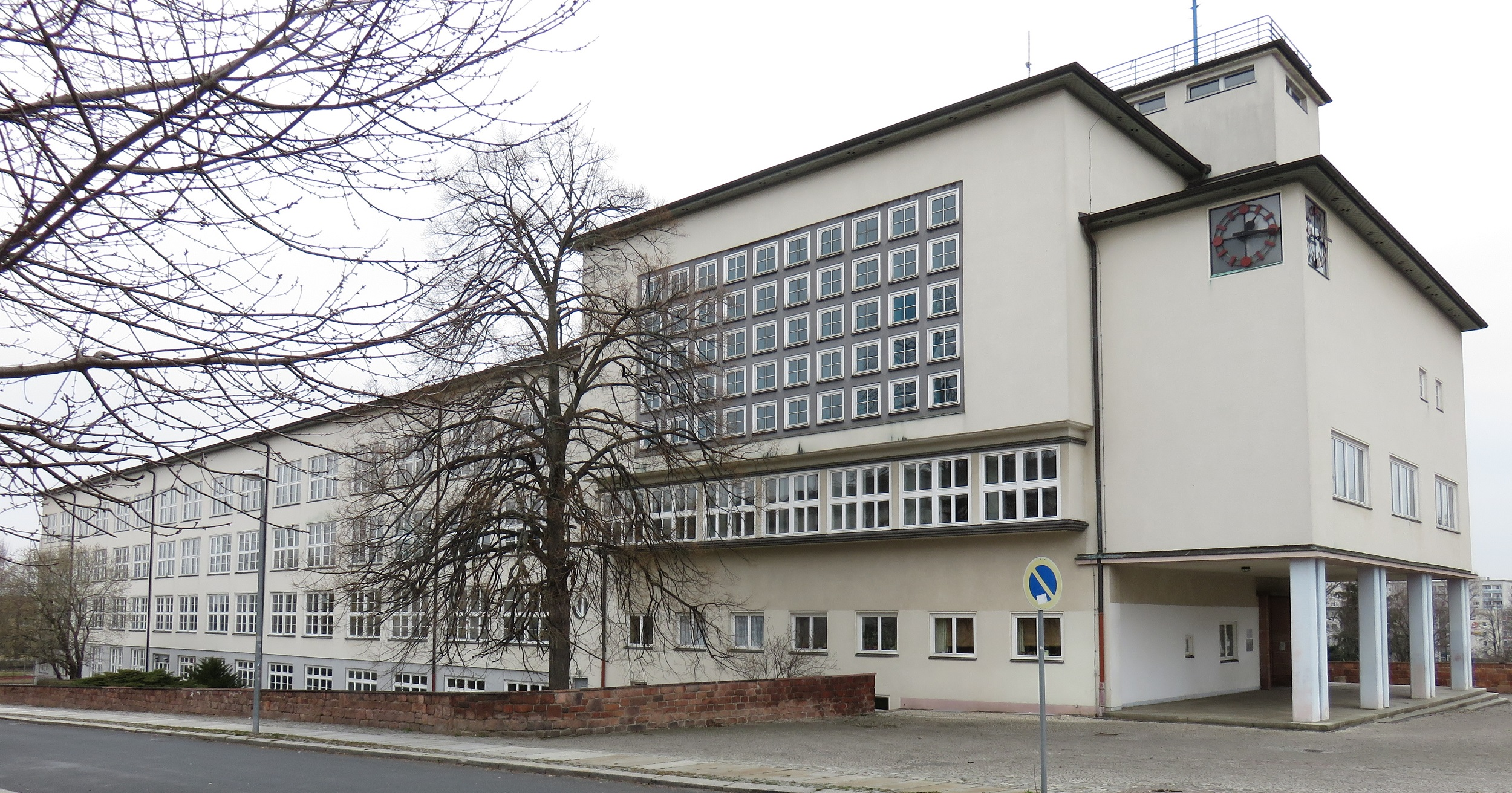 Diesterweg-Schule in Chemnitz-Gablenz, Kreherstraße; erbaut 1928-1930, unter Denkmalschutz